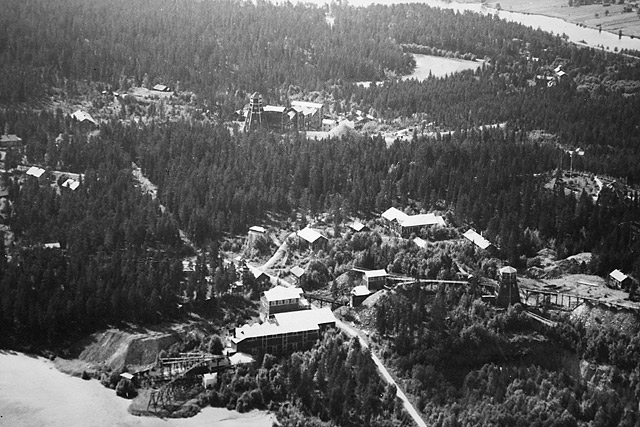 Flygfoto över gruvorna i Ickorrbotten (närmast i bild) och Iviken.